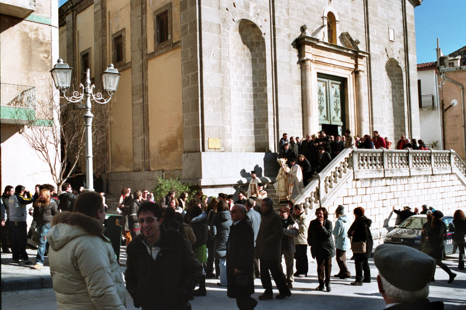 Piana degli Albanesi Procession of Epiphany, 2007